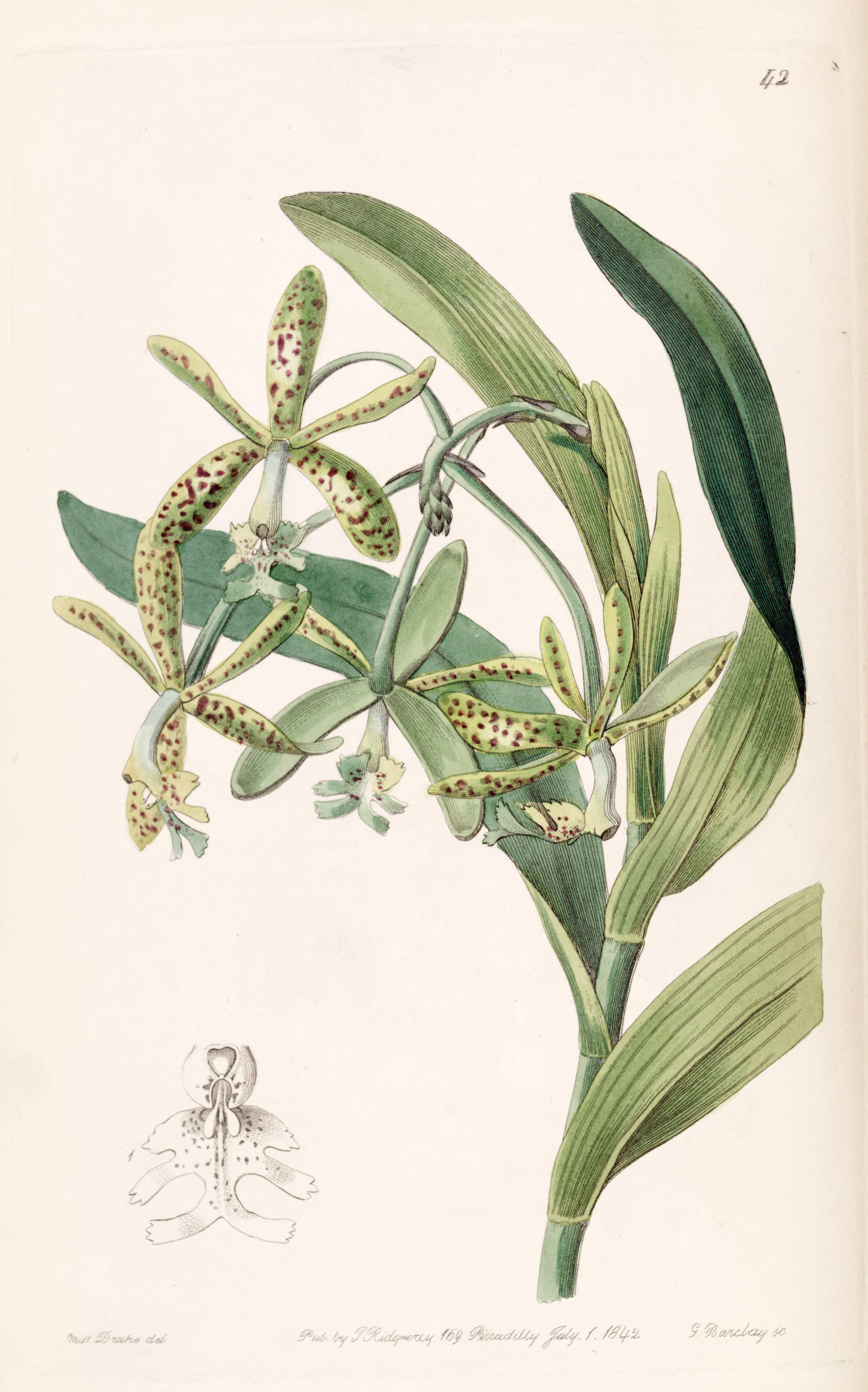 Epidendrum cristatum (as syn. Epidendrum raniferum)